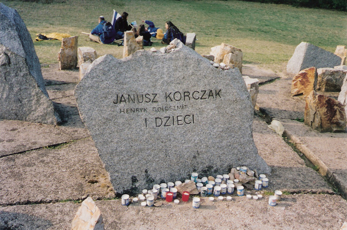 סלע זכרון ליאנוש קורצ'אק והילדים in treblinka